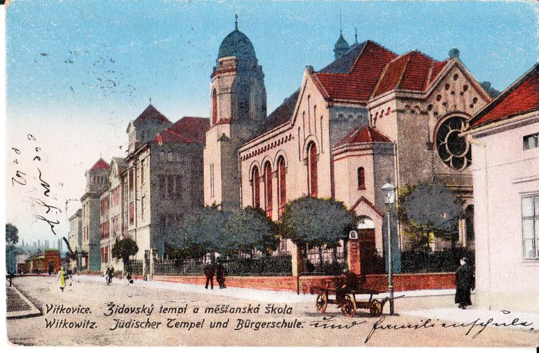 Dobová pohlednice vítkovické synagogy